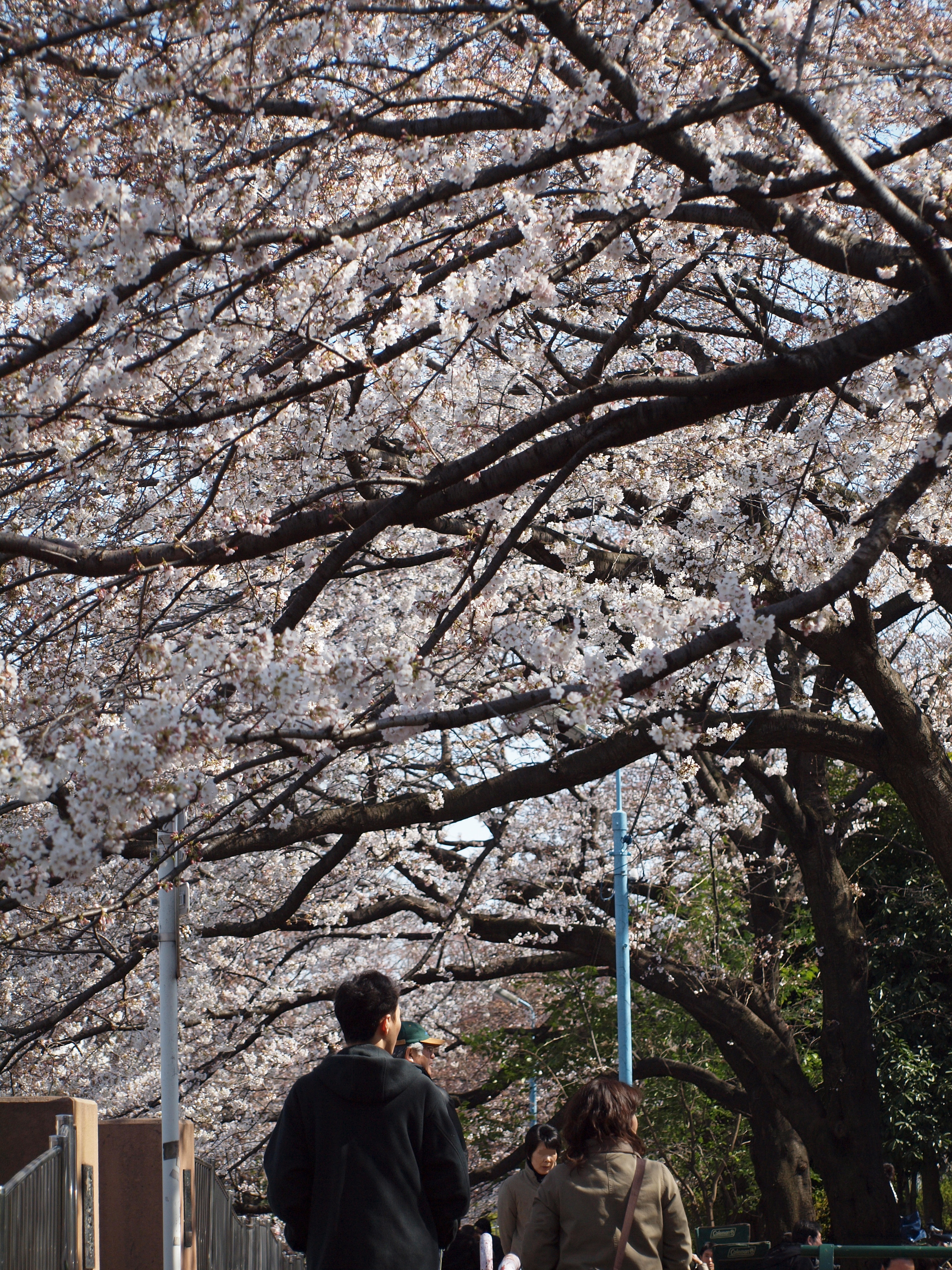 善福寺川緑地。